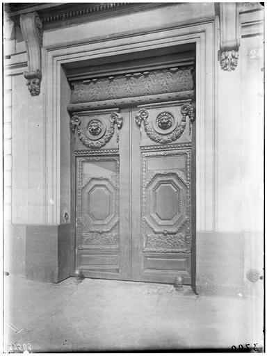 Façade sur rue, portail